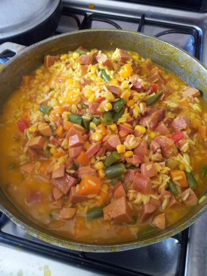 Preparación de Locrio Mixto Dominicano